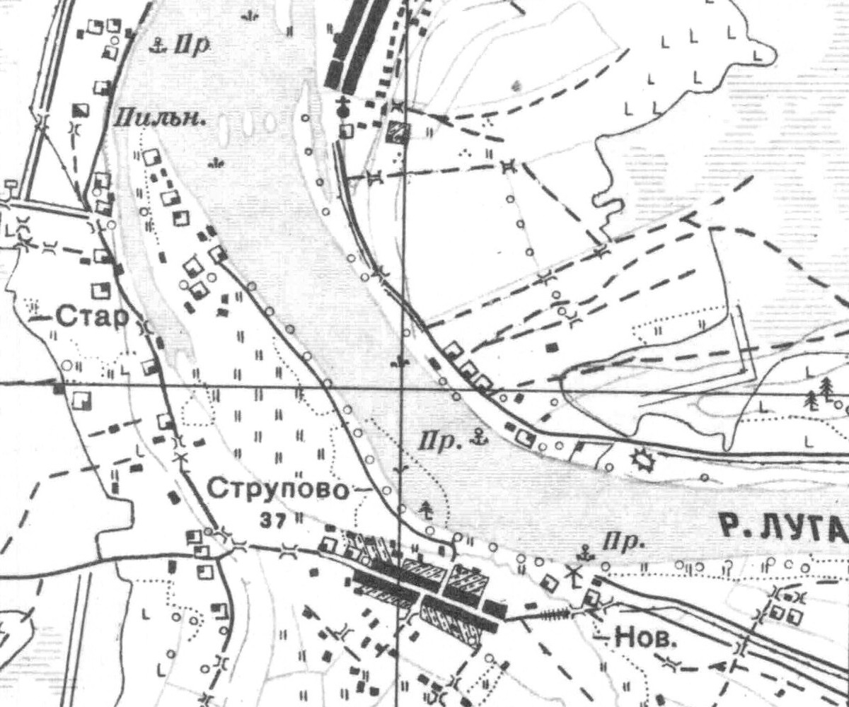 Топографическая карта Ленинградской области, квадрат О-35-21-А-б (Бол. Куземкино), деревня Струпово.